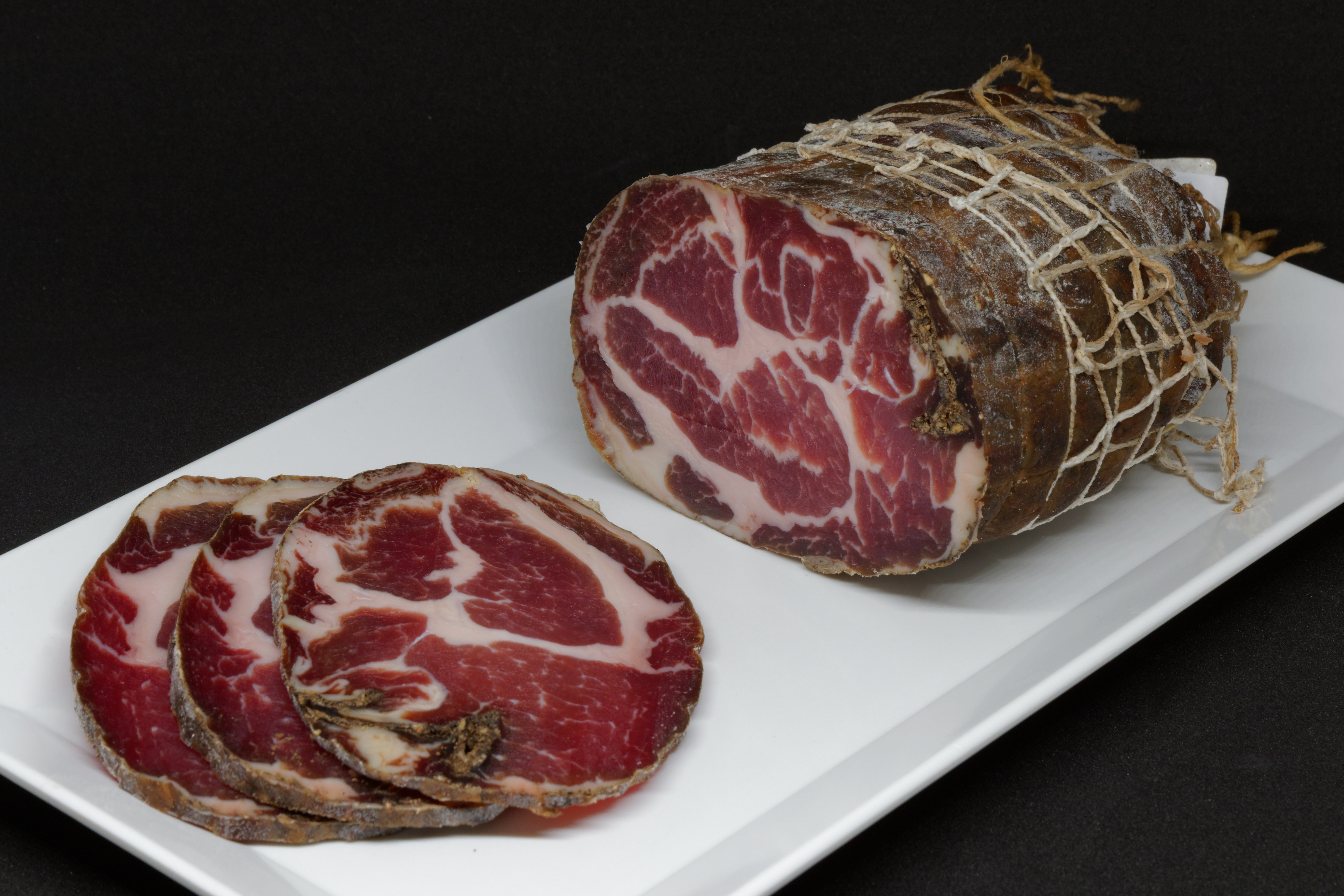 De la coppa corse.